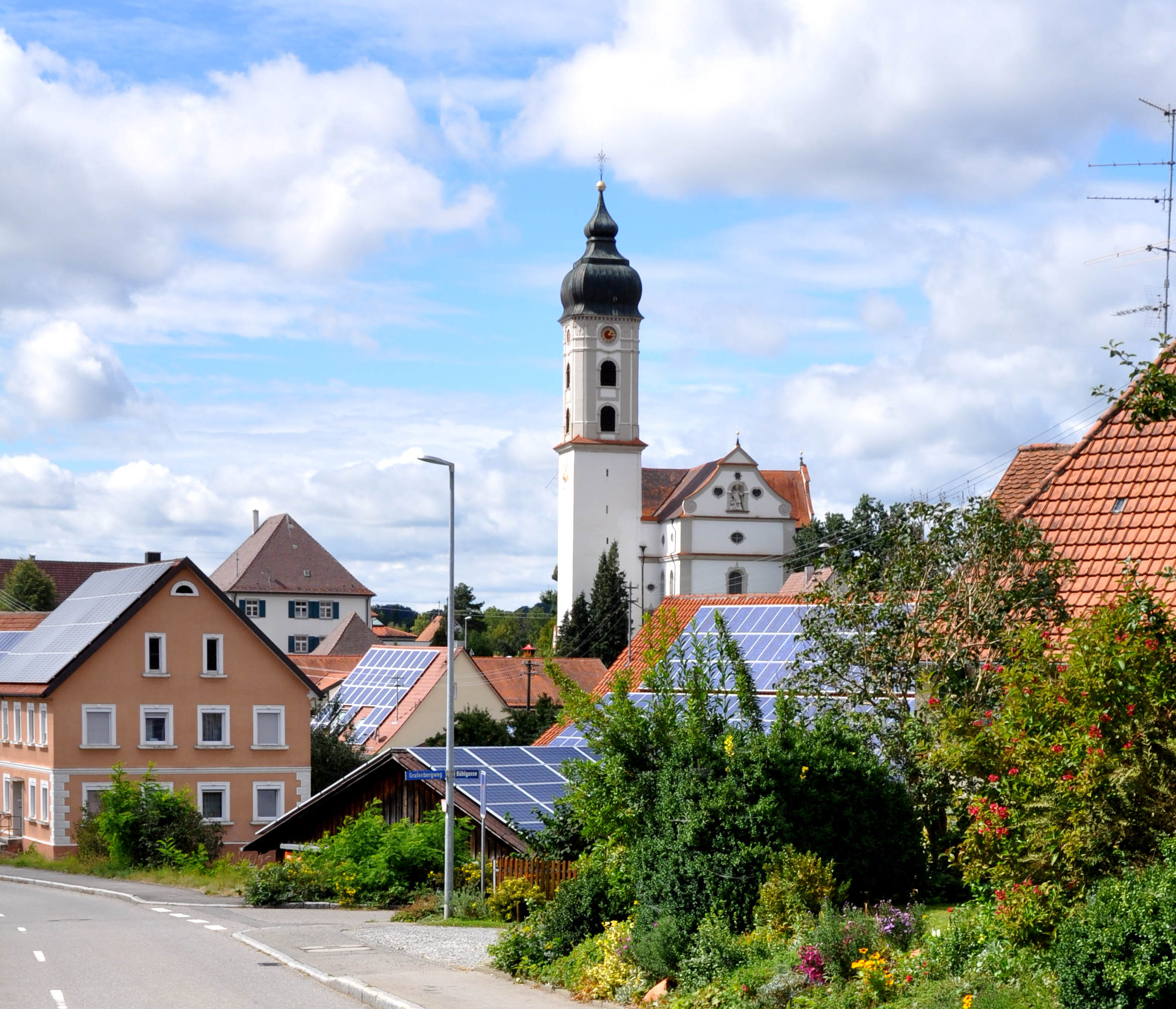 Katholische Pfarrkirche St. Martin, Unteressendorf, Gemeinde Hochdorf (Riß)